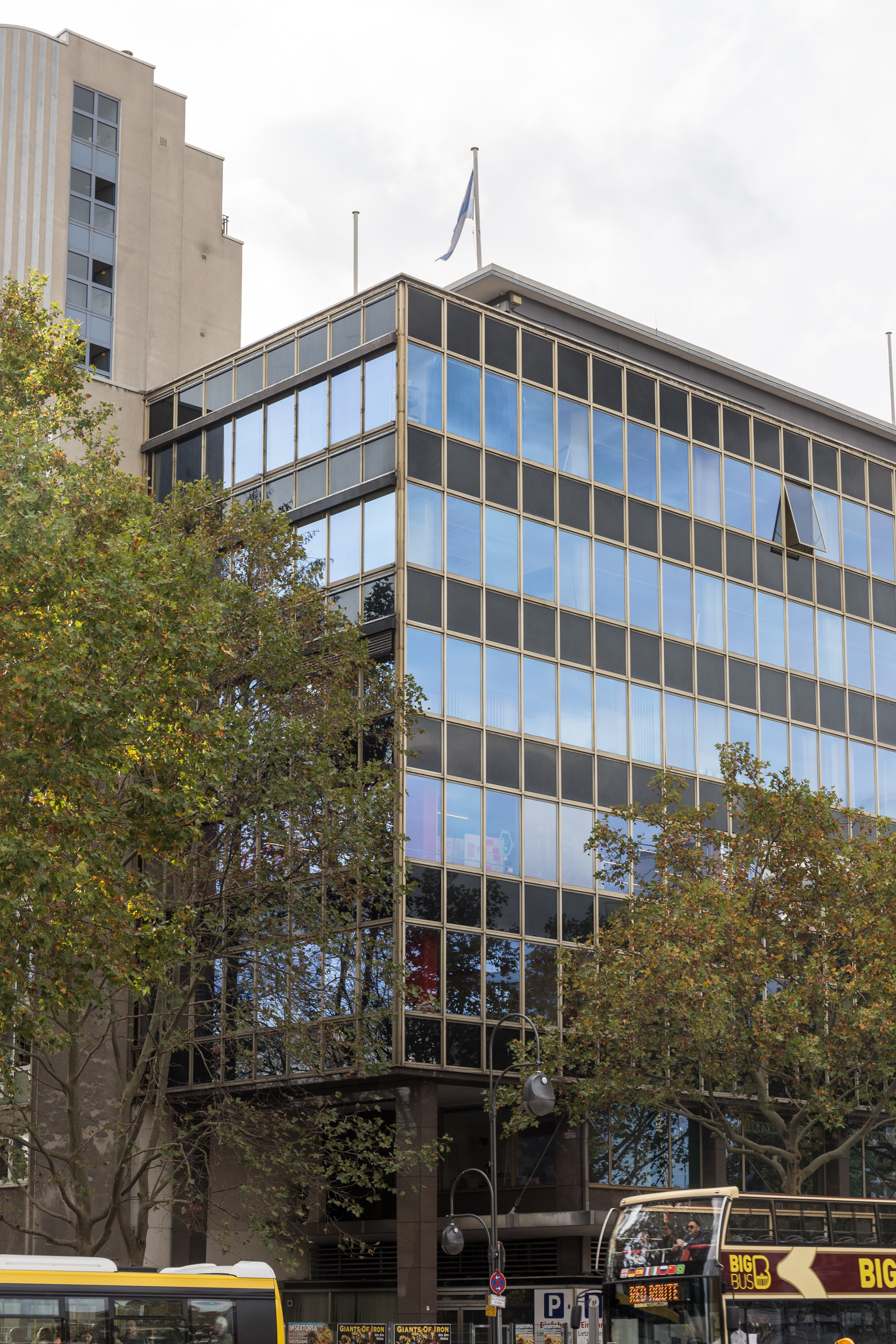 Ambassade d'Argentine à Berlin, Kleiststraße 23-29.